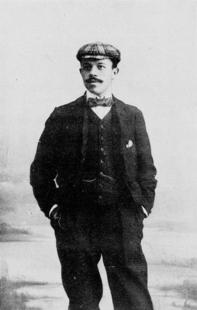 Alphonse Baugé, directeur sportif d'équipes cyclistes. Illustration issue de : Alphonse Baugé (préf. Oscar Méténier), Le Tour de France, 1907 : lettres à mon directeur, Paris, Librairie de L'Auto, 1908, 123 p.